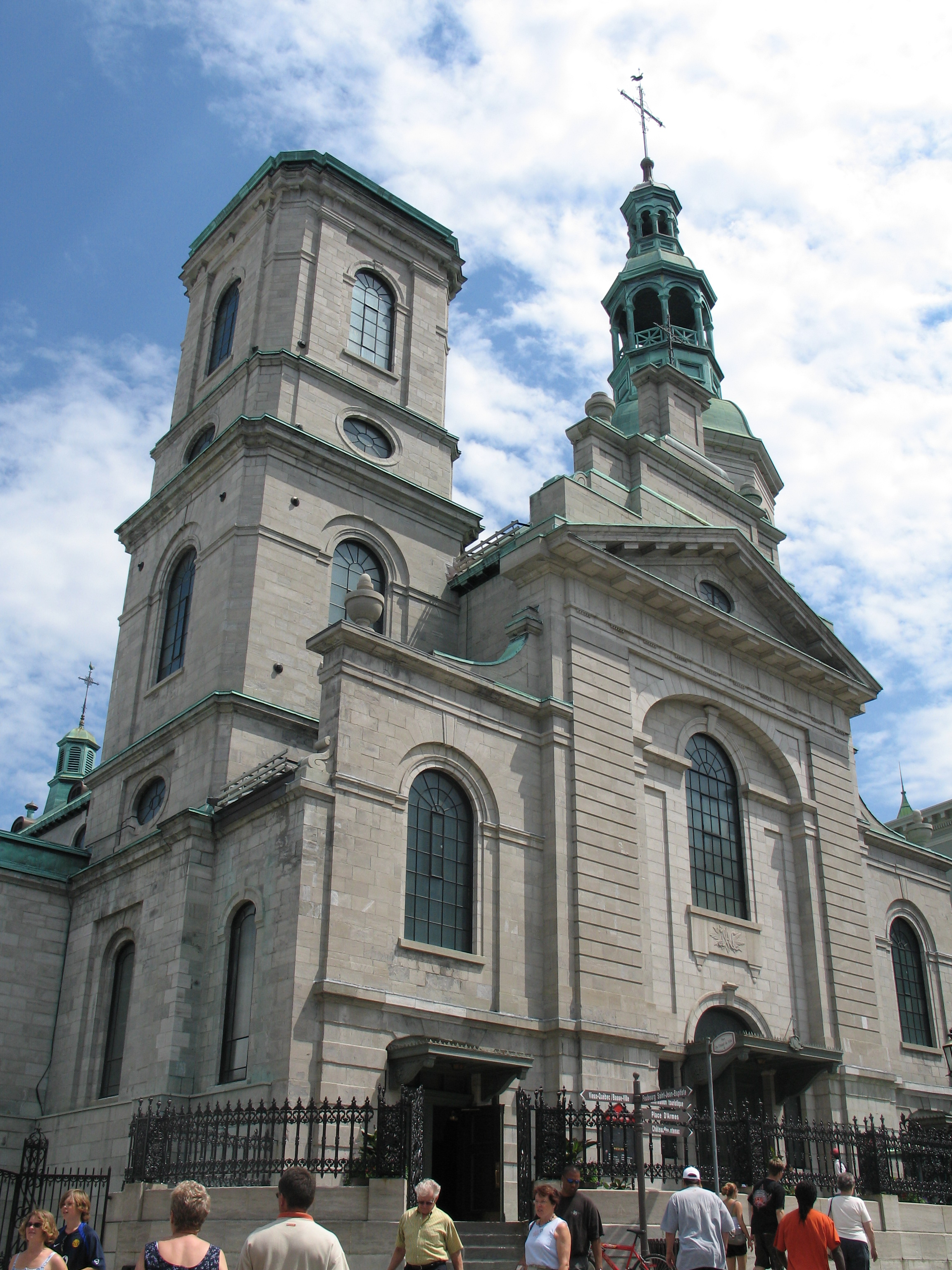 La Basilique-cathédrale Notre-Dame de Québec, dans la vieille ville de Québec. (Photo: Claude Boucher)